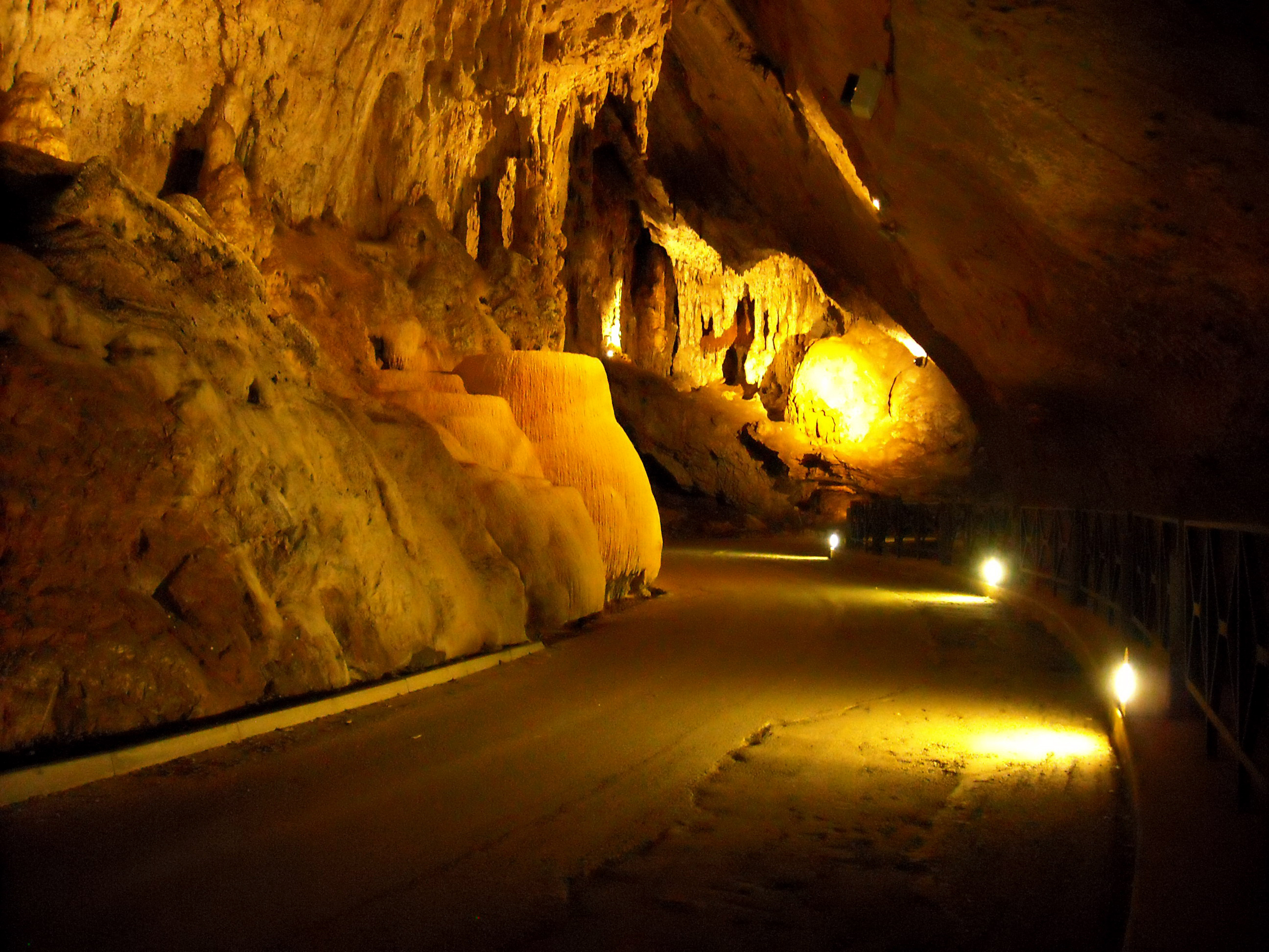 Grotte di San Giovanni - MIBAC This is a photo of a monument which is part of cultural heritage of Italy.